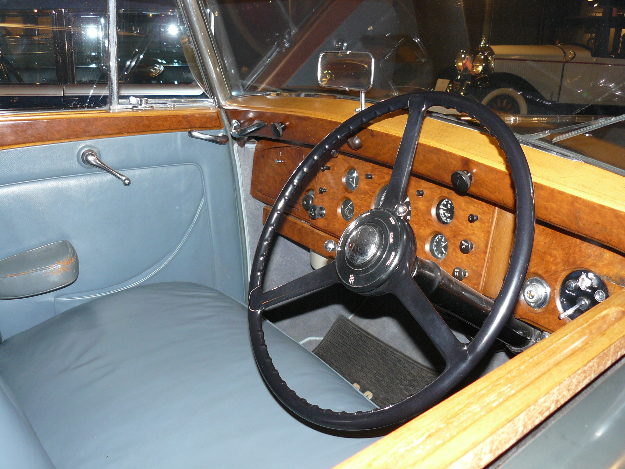 Musée d'Auburn 2013.